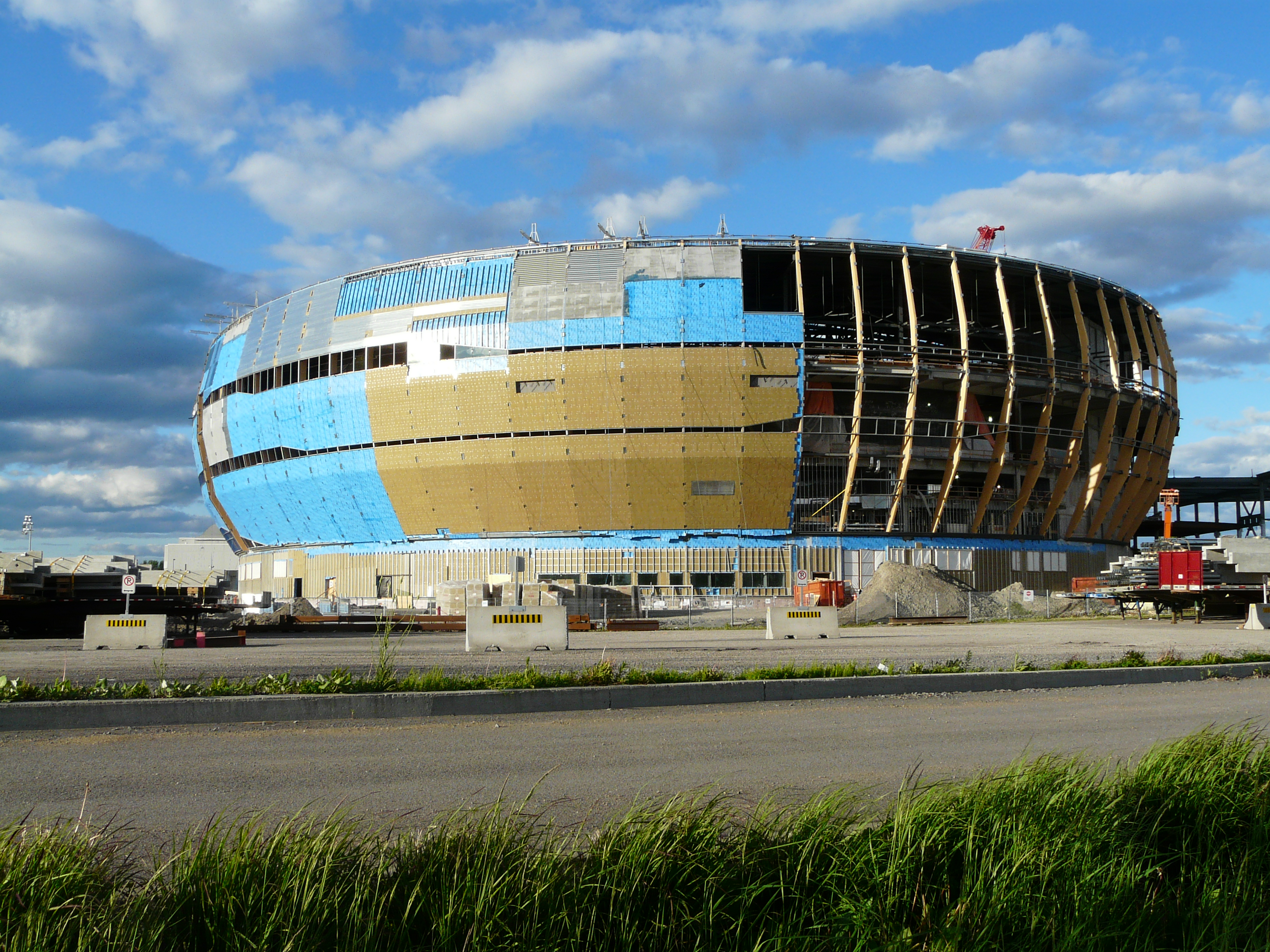 L'amphithéâtre de Québec en construction, vue arrière, juin 2014